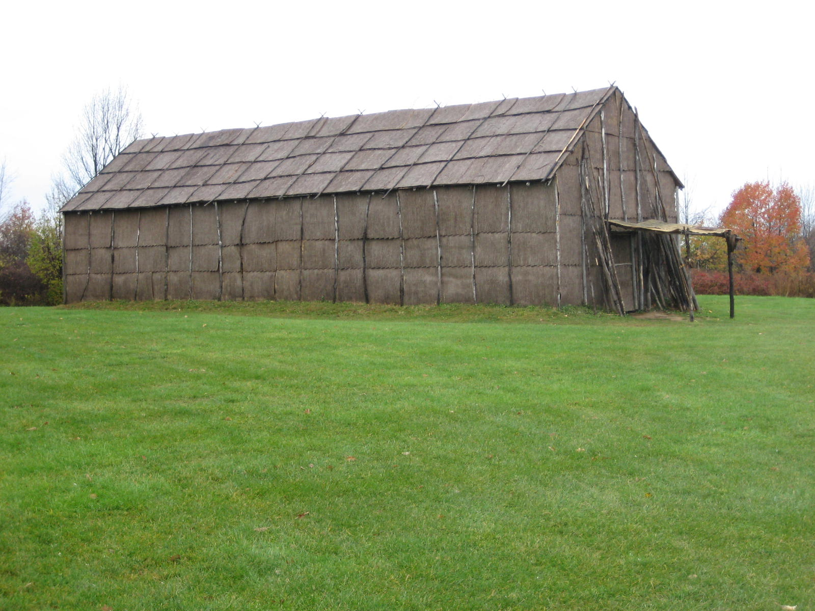 Gonondagan Long House